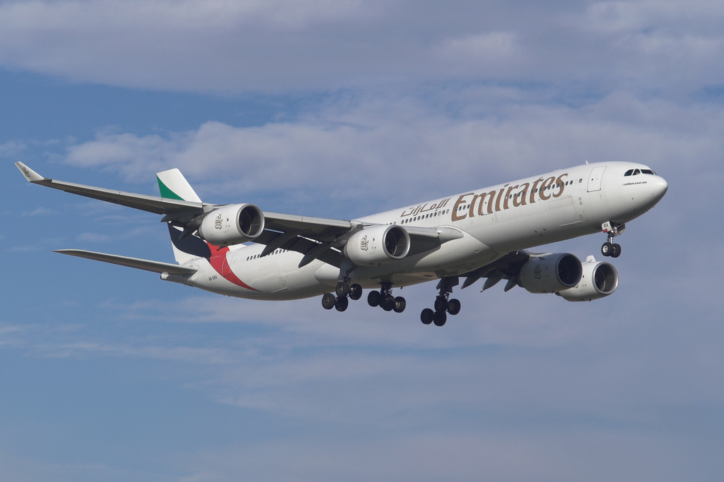 Emirates A340-500 A6-ERA